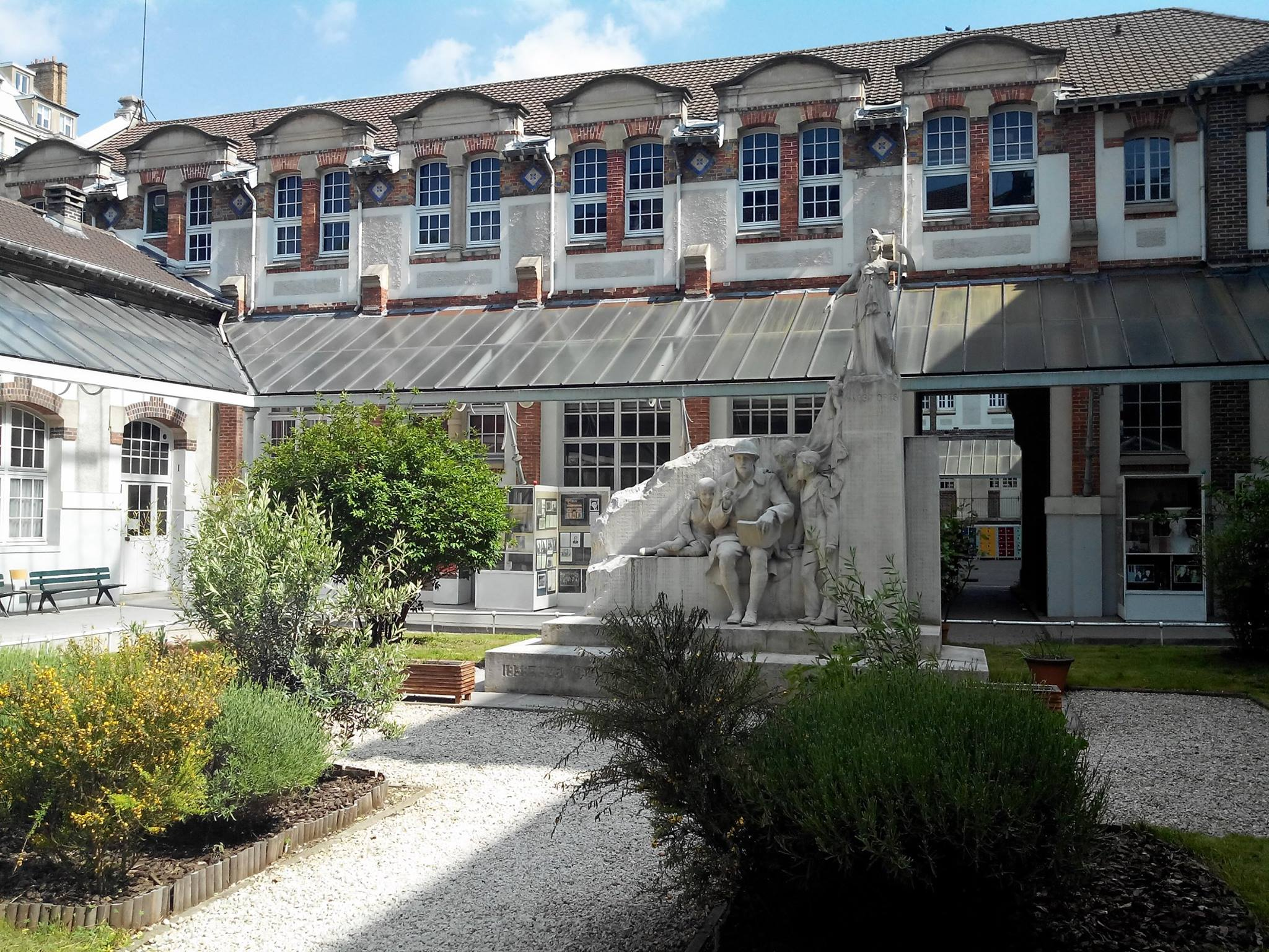 Dans le cloitre